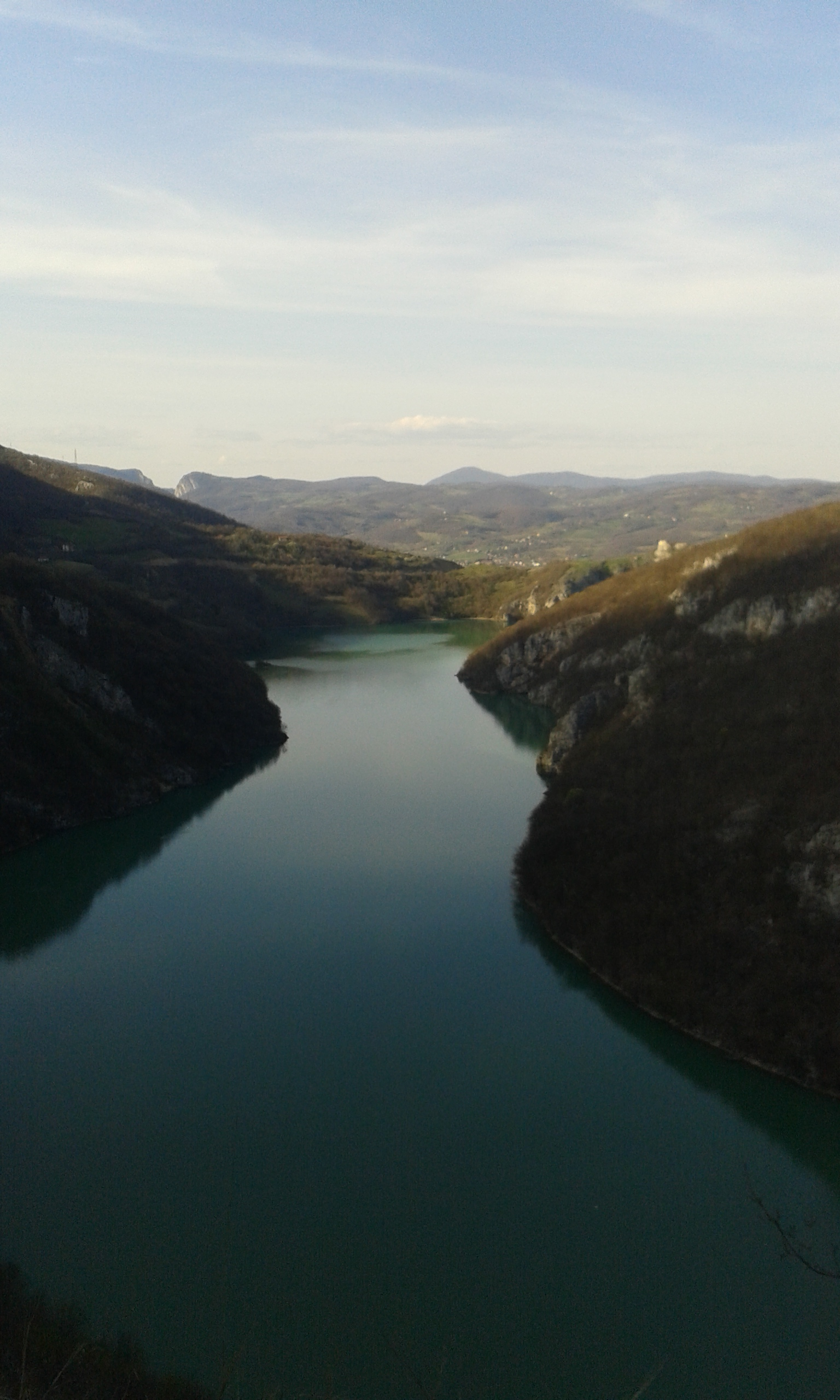 Кањон ријеке Врбас